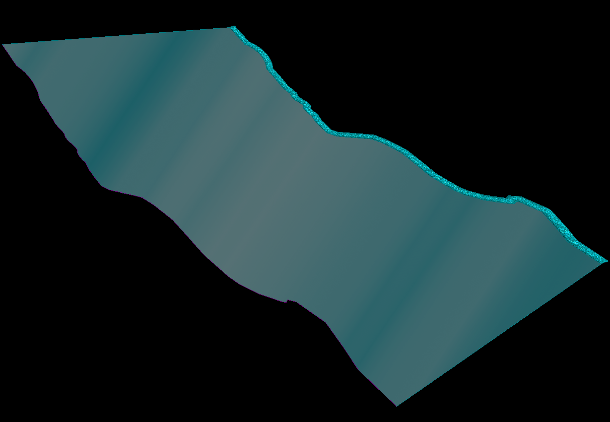 Illustre schématiquement une partie de la surface d'univers d'une corde ouverte.